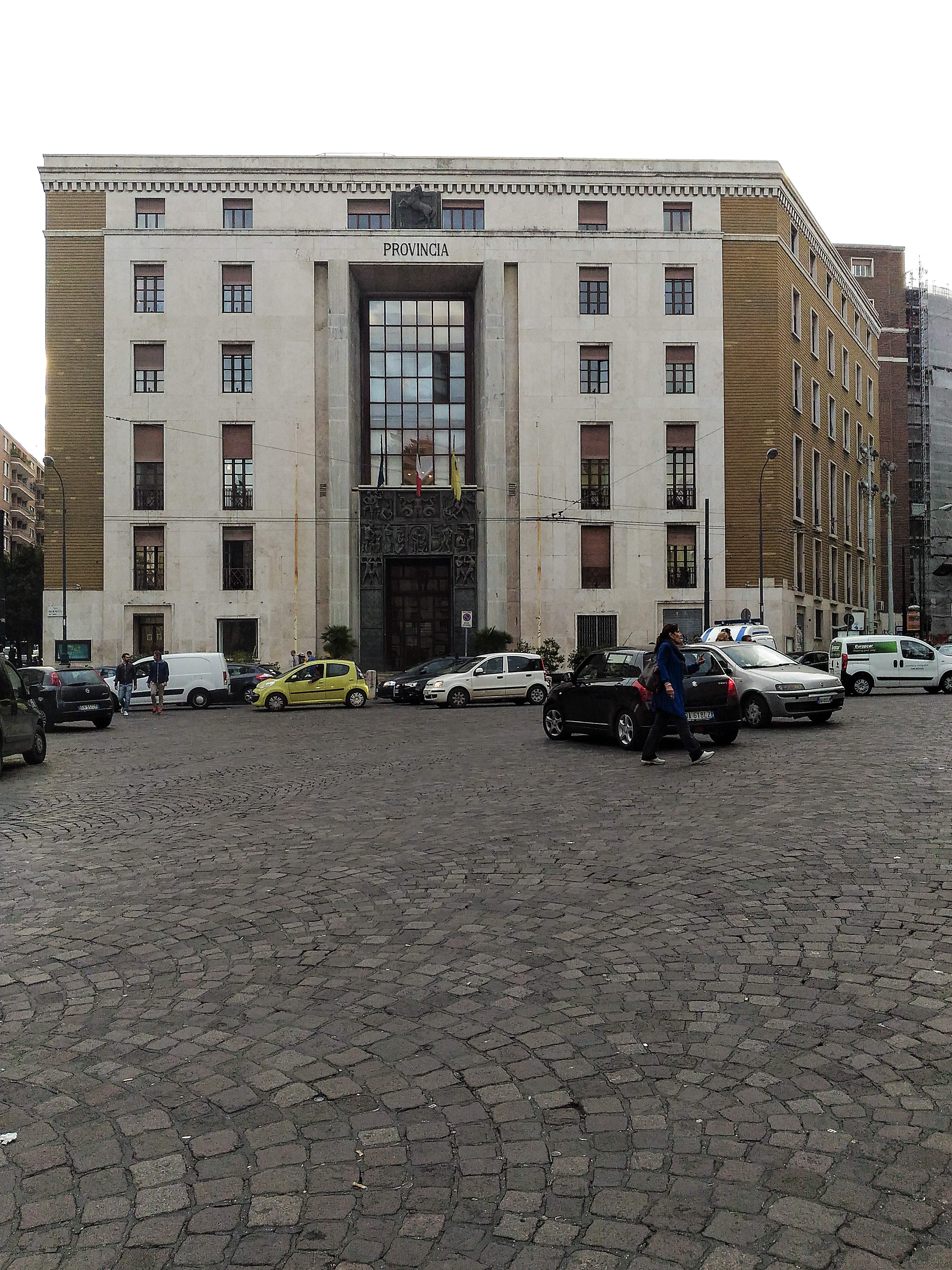 Prospetto su piazza Matteotti